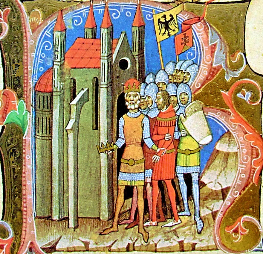 Solomon of Hungary and Henry IV, Holy Roman Emperor